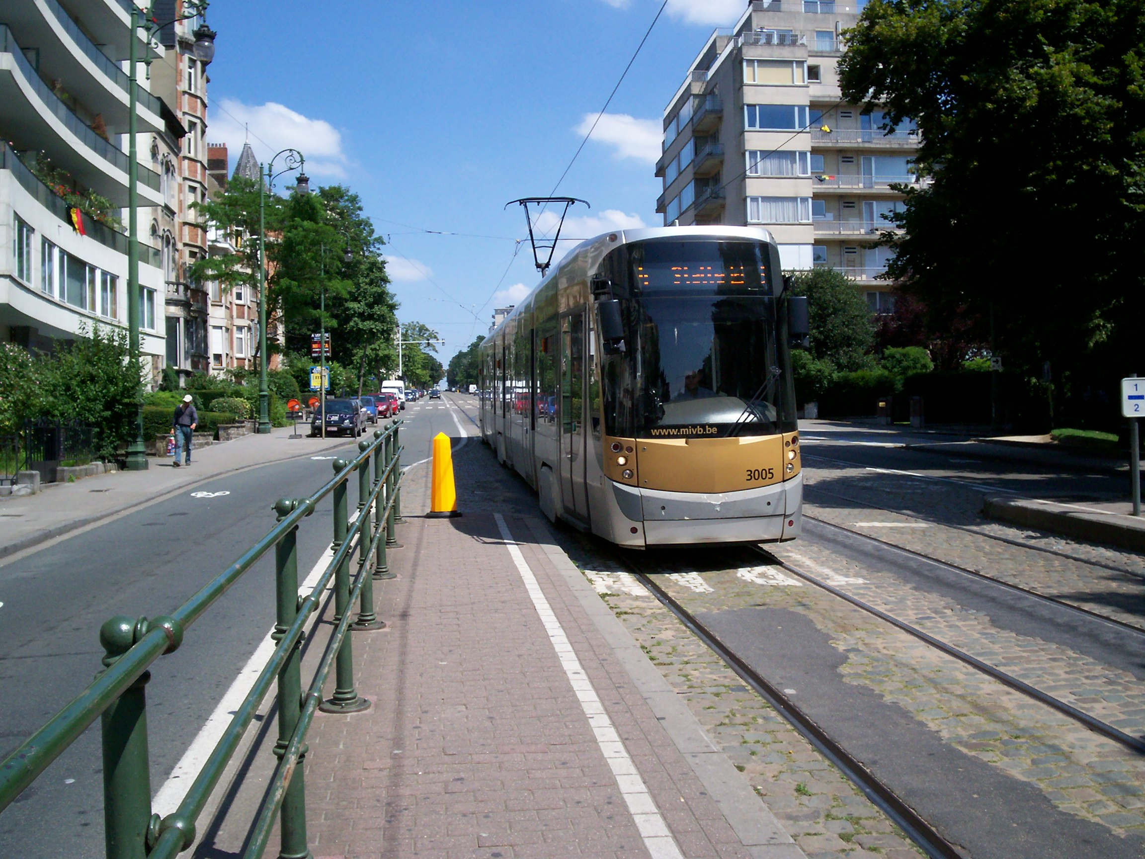 T 3000 de la ligne 4 à la station Héros et en direction d'Esplanade